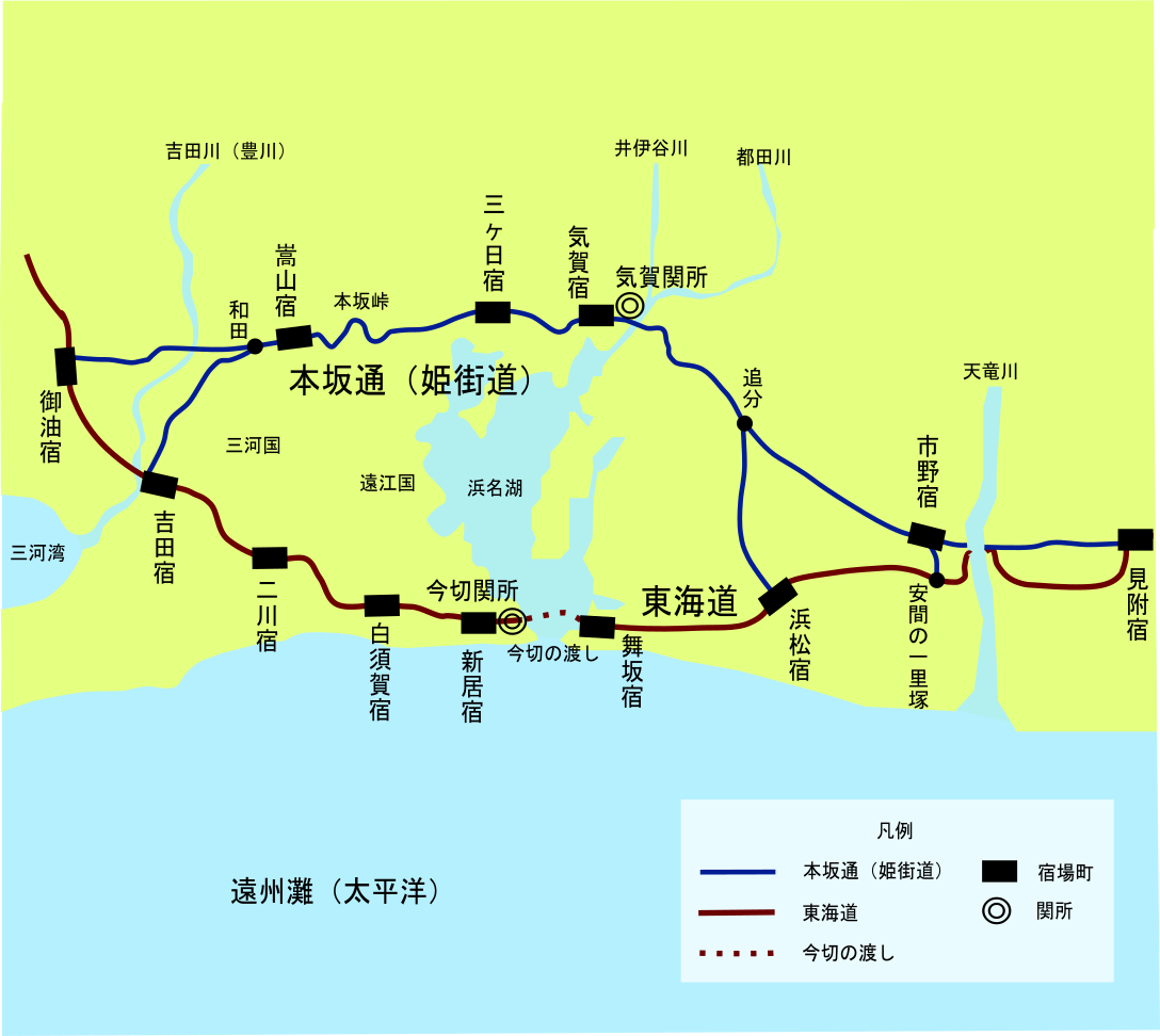 本坂通（姫街道）と東海道の行程。